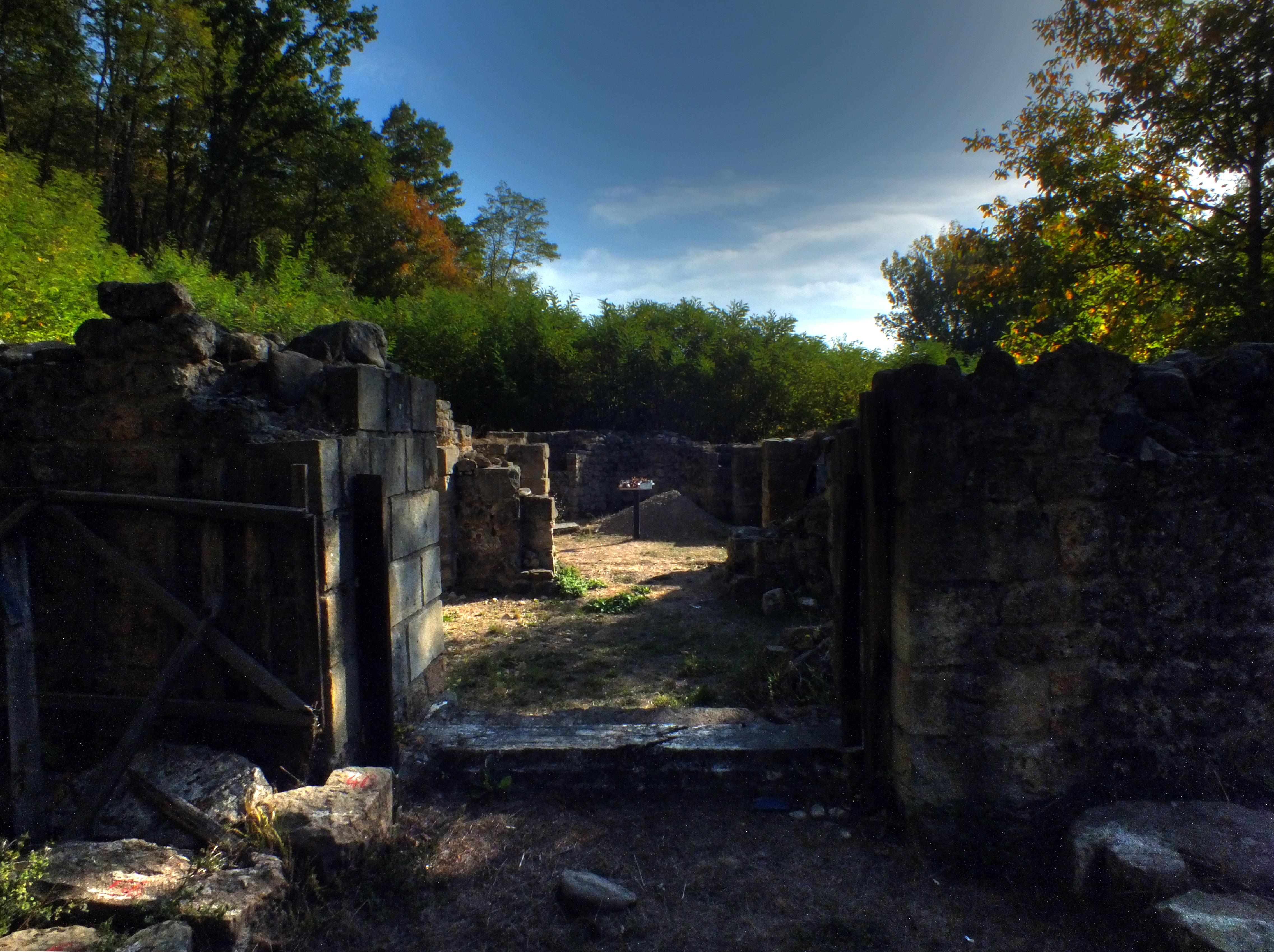 IManastir Milentija pored Brusa, najverovatnije iz XV veka, je izraziti primerak Moravske škole. Mesto koje pleni mirom